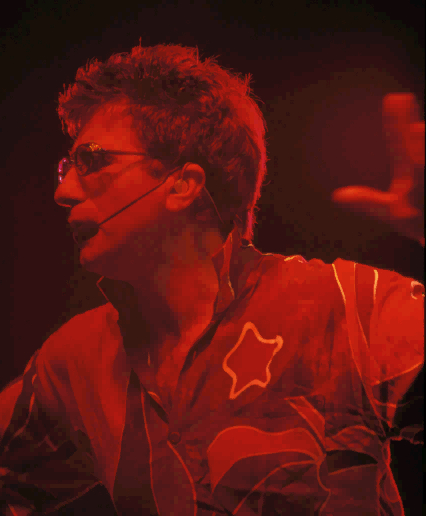 Tonj Acquaviva